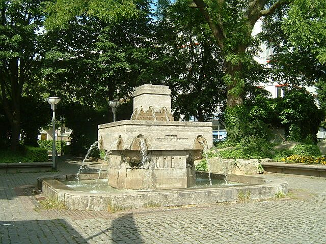 fountain in Frankfurt-Eschersheim on the Weißer Stein. self made on 4. June 2006 --Peng 12:00, 5 June 2006 (UTC)